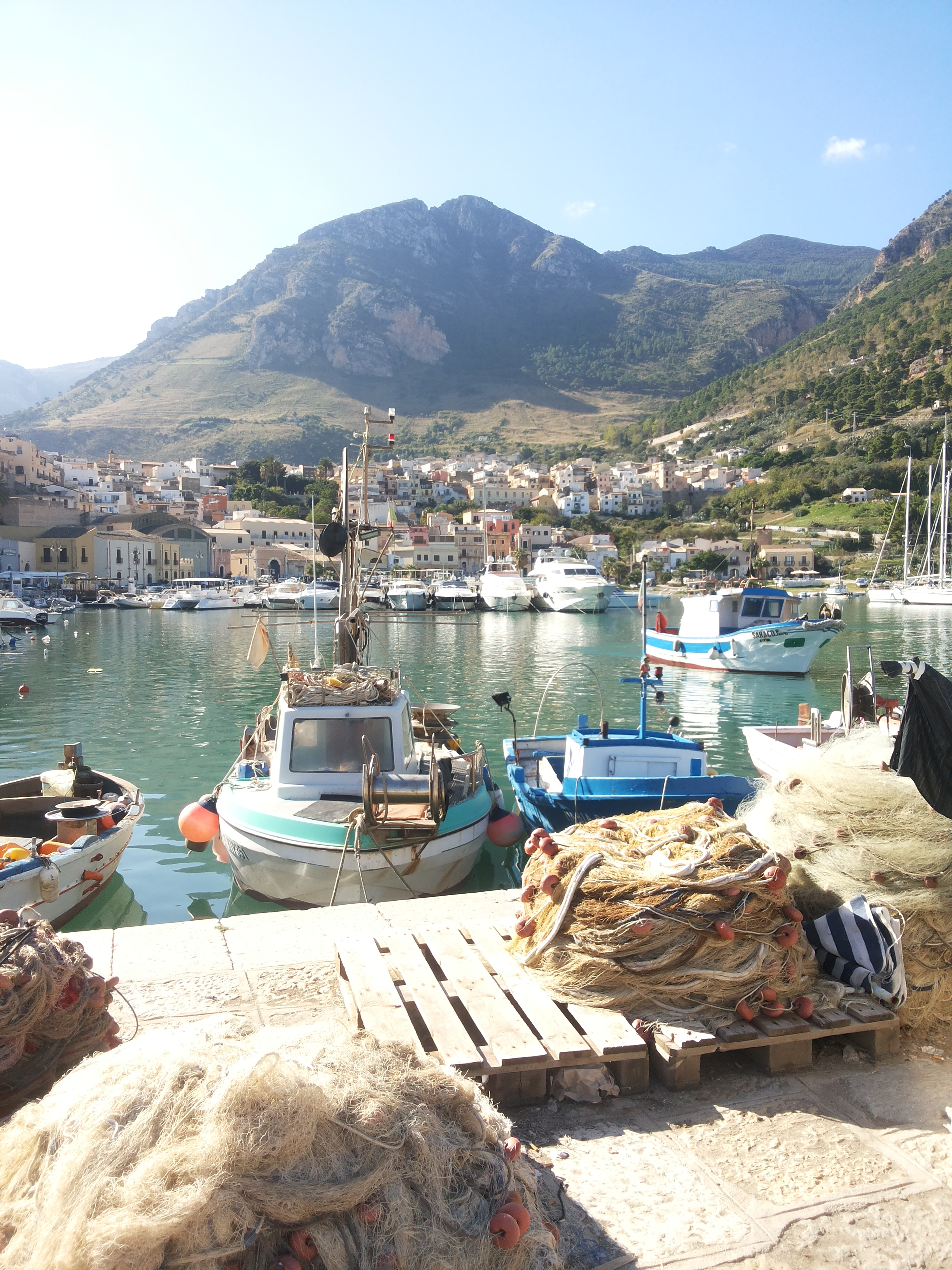 Marina di Castellammare del Golfo - Barche al molo